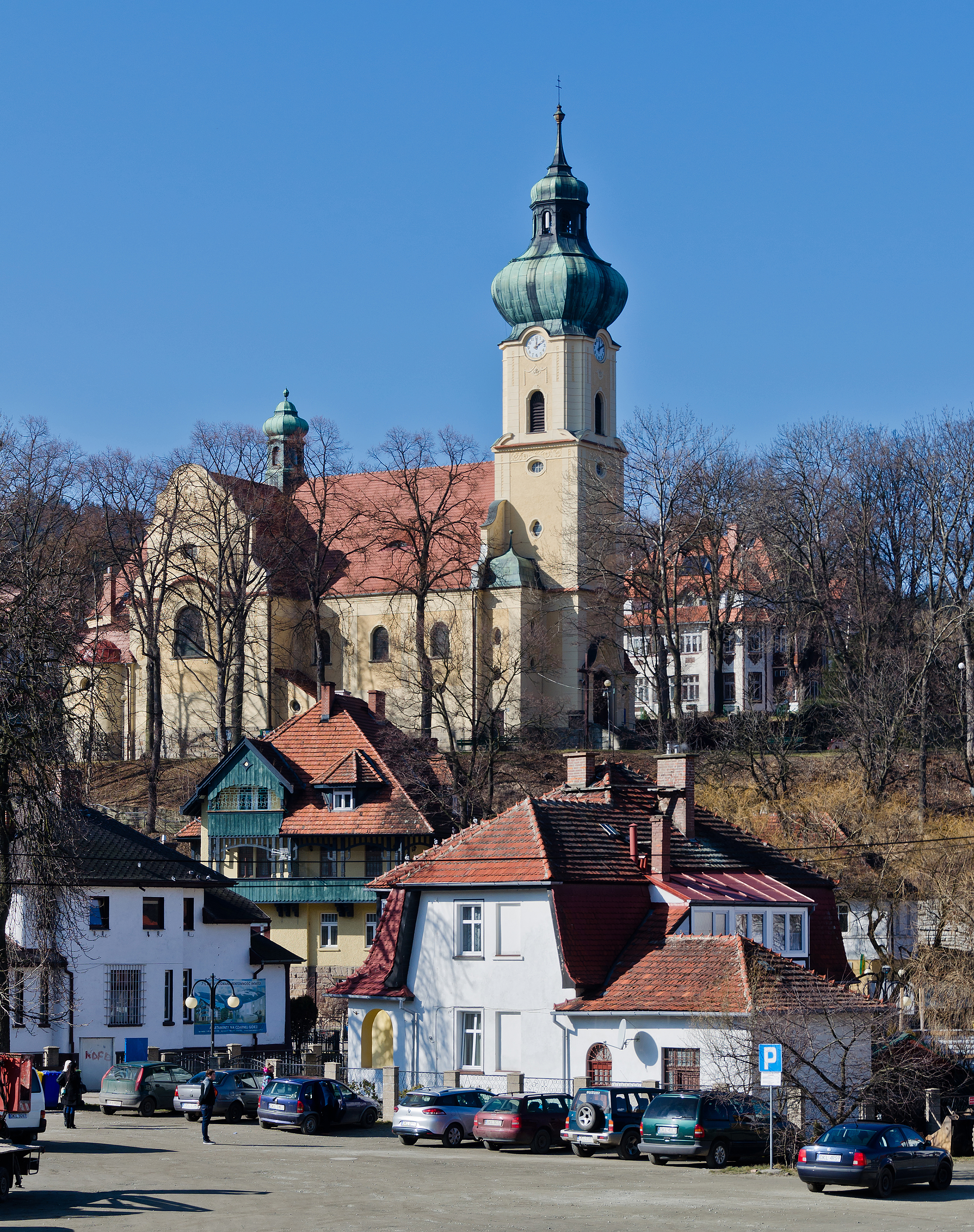 Polanica-Zdrój, kościół par. p.w. Wniebowzięcia NMP, 1910